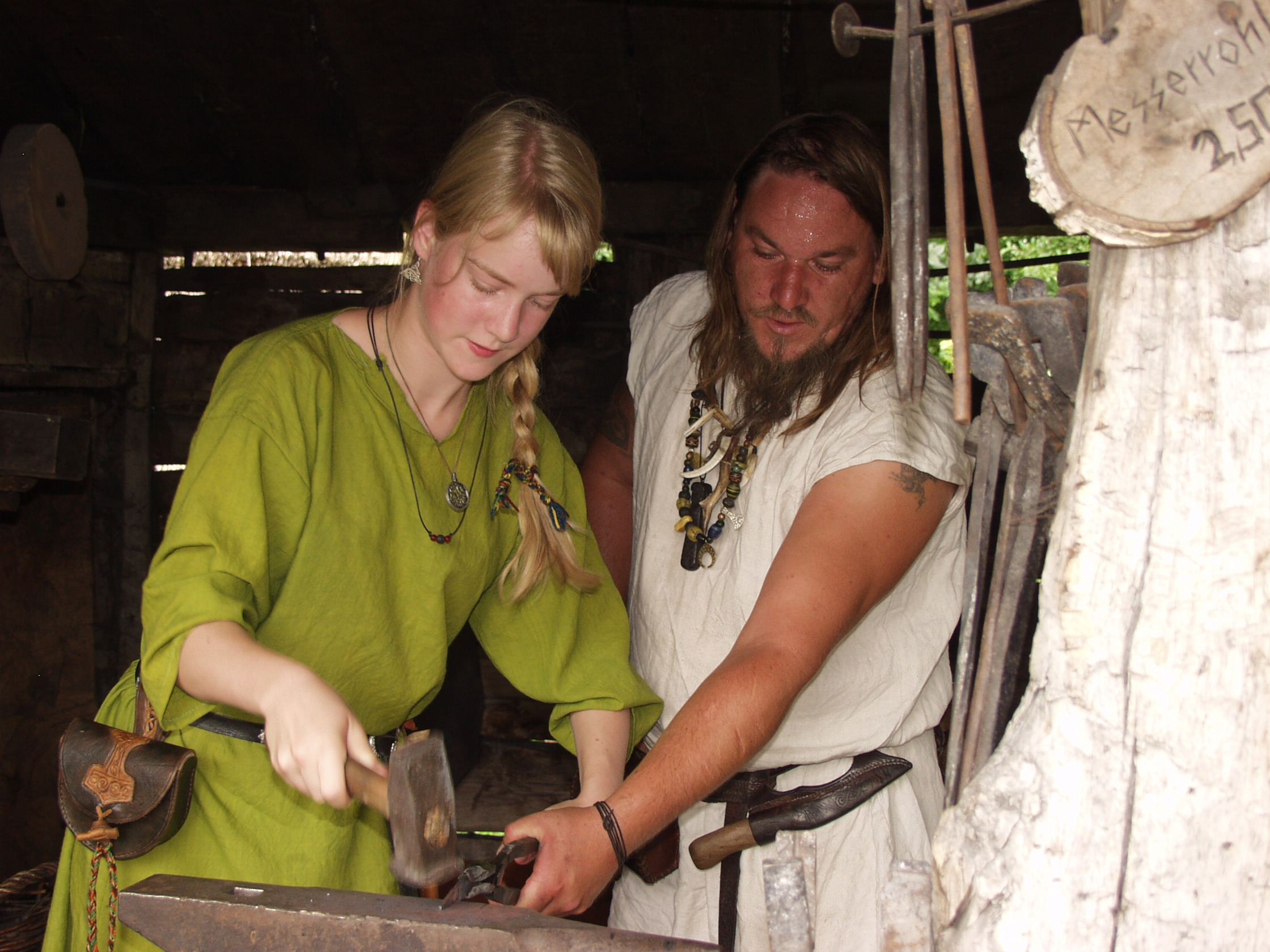 Freilichtmuseum Ukranenland, Torgelow - Schmied und Lehrling